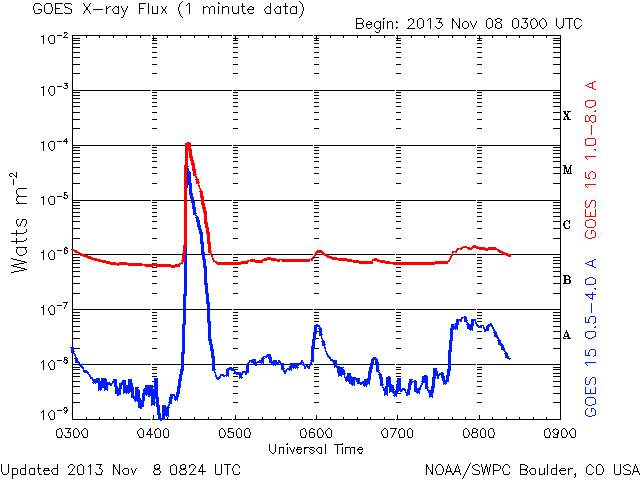 The November 8, 2013 X1,1-class solar flare erupted by AR1890. Record from the GOES 15 X-ray Flux real-time monitor (3 days, 5-min data).